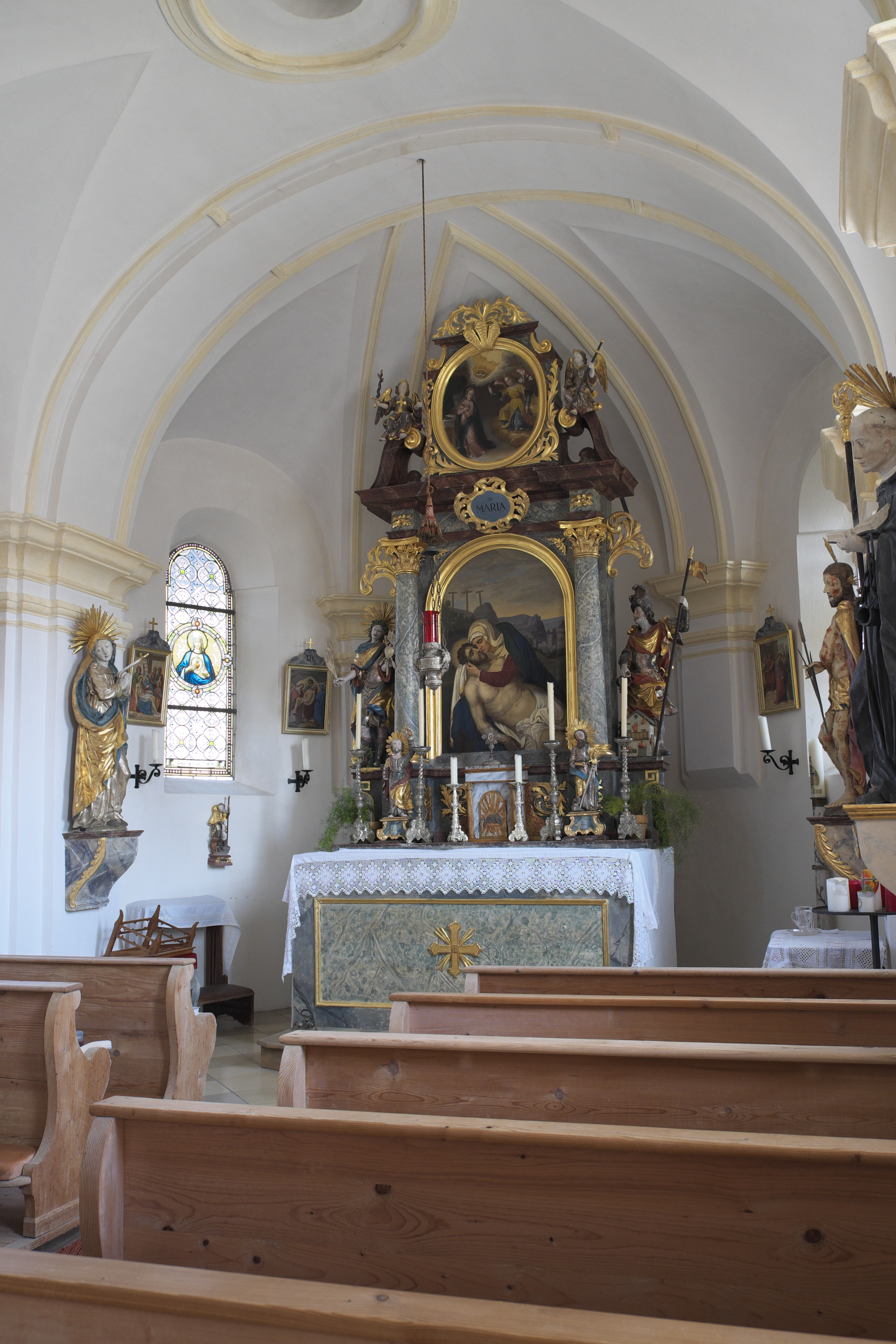 Katholische Kapelle St. Rochus und St. Sebastian in Sollach (Valley) im Landkreis Miesbach (Bayern/Deutschland), Innenraum